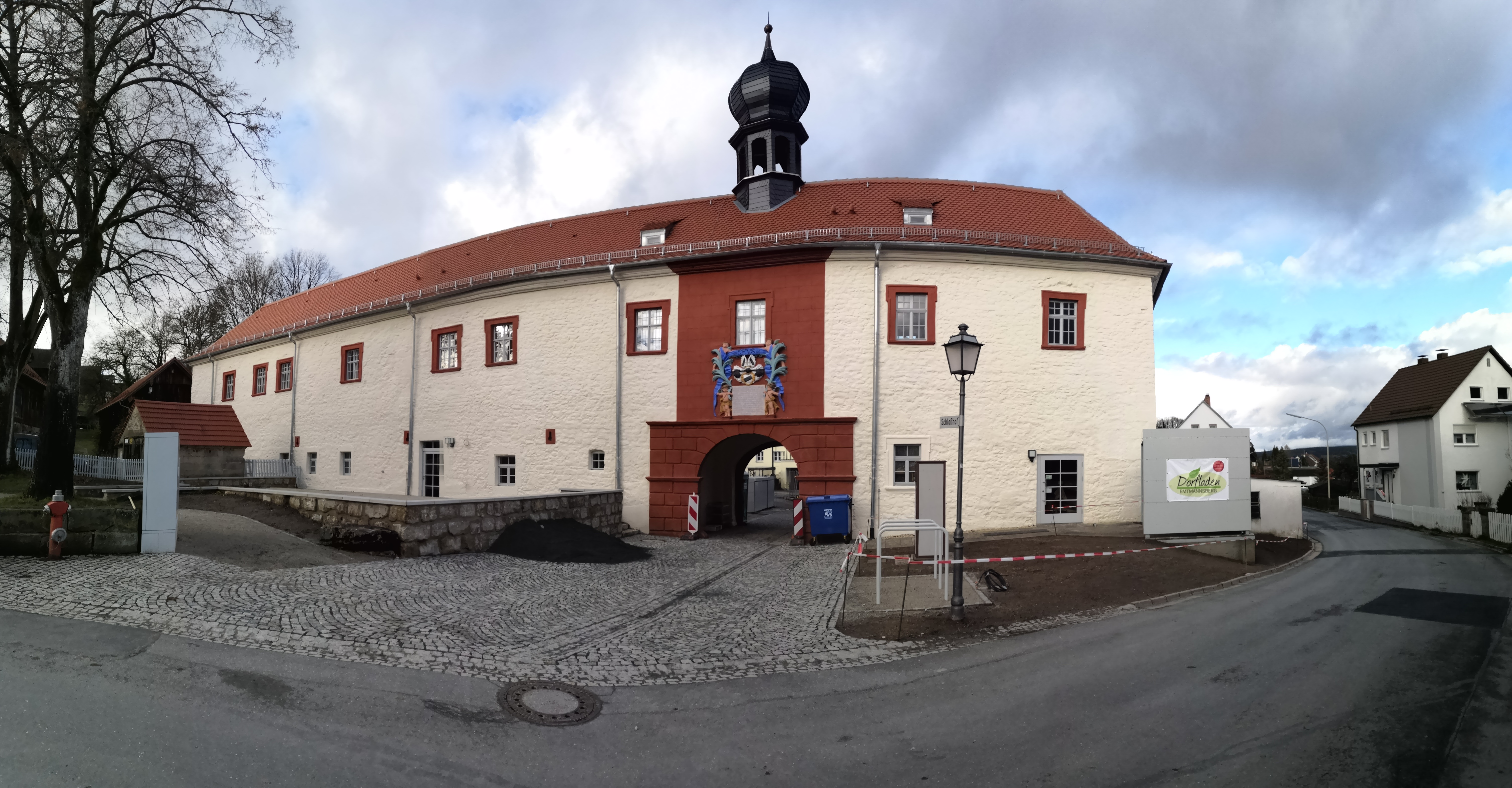 Das heutige Schloss Emtmannsberg, nach dem renovieren.